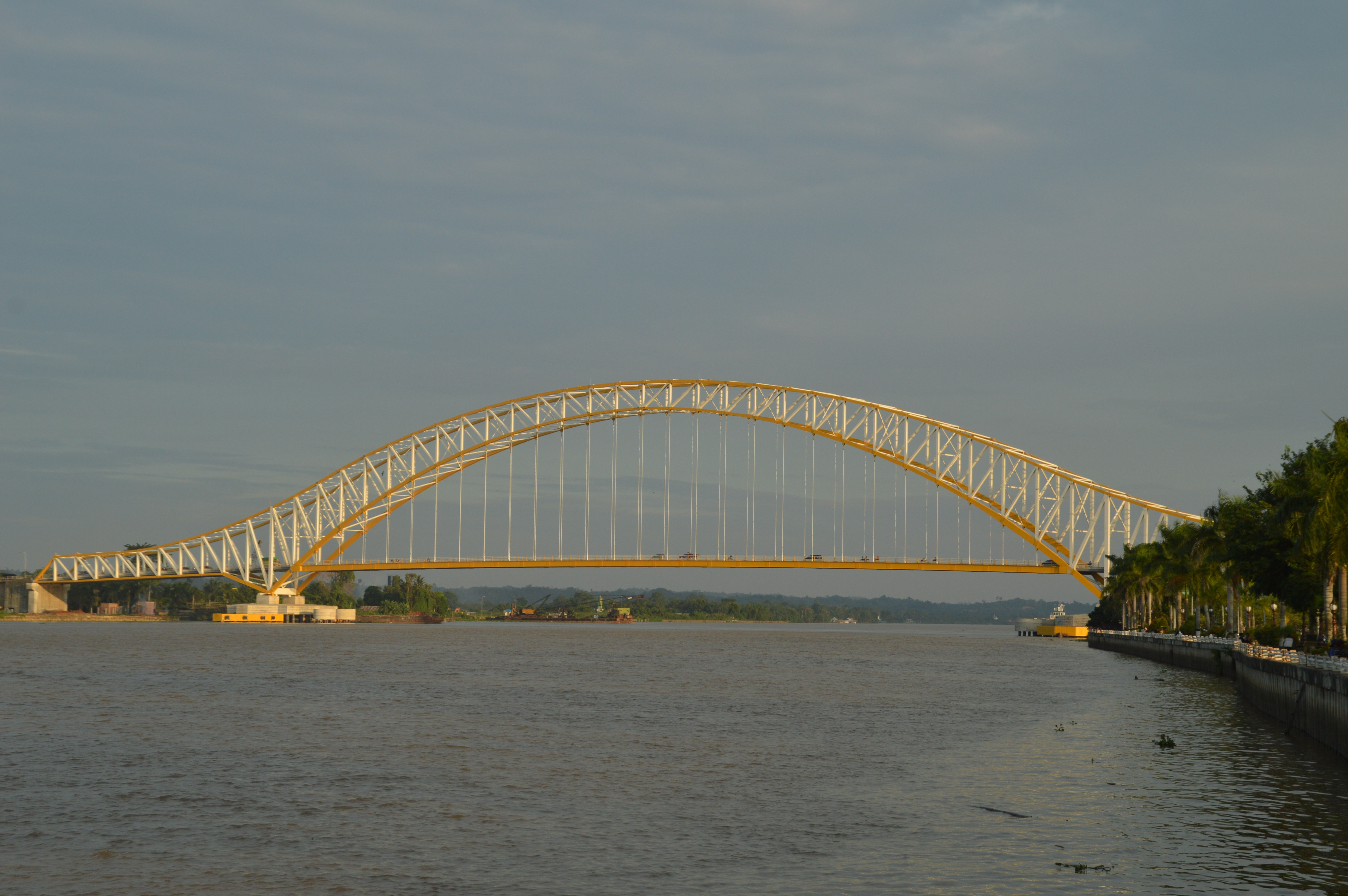 Jembatan Kutai Kartanegara di Kalimantan Timur dengan struktur dan desain baru.